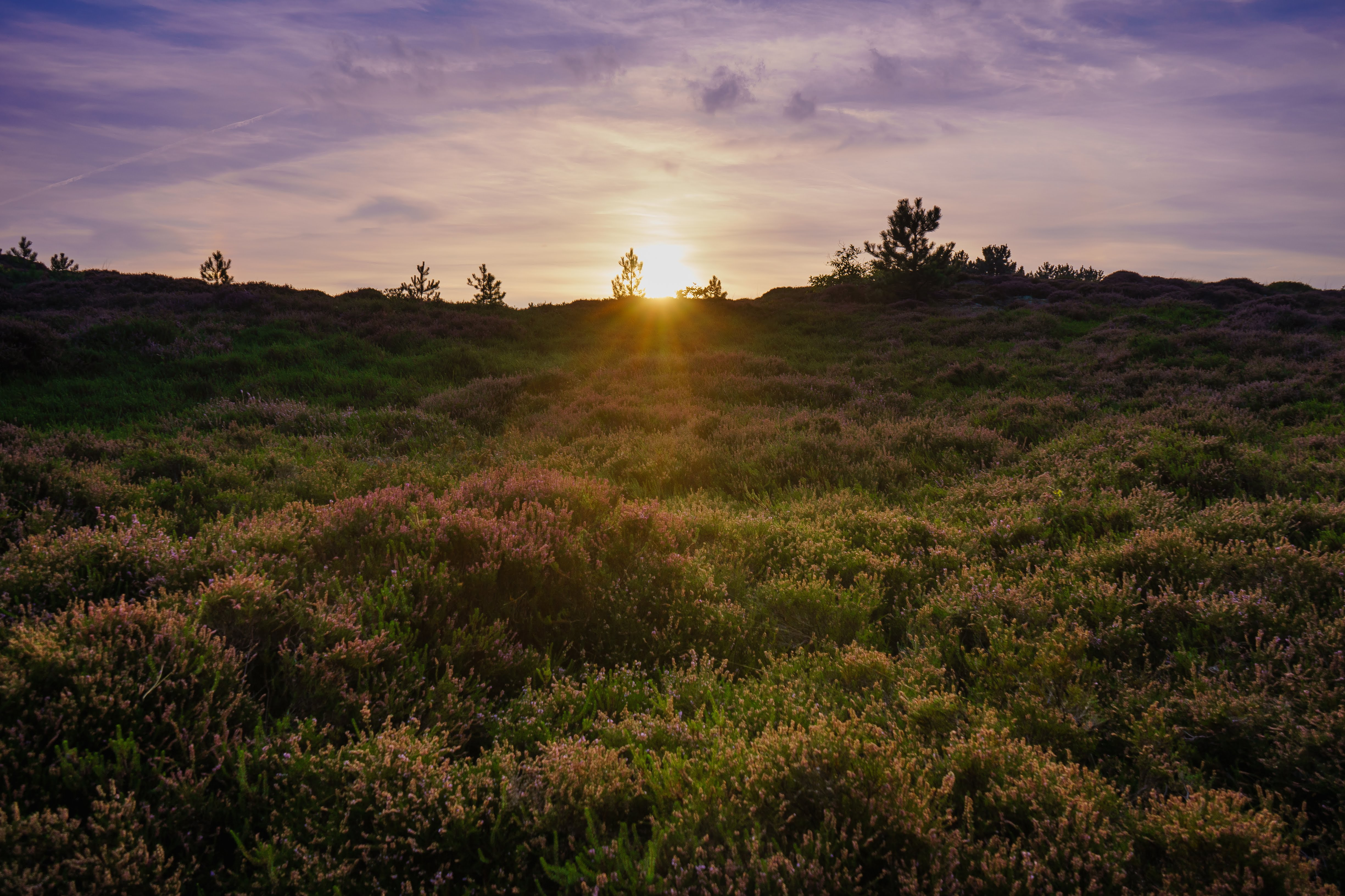 Zu sehen ist die "Amrumer Heide".